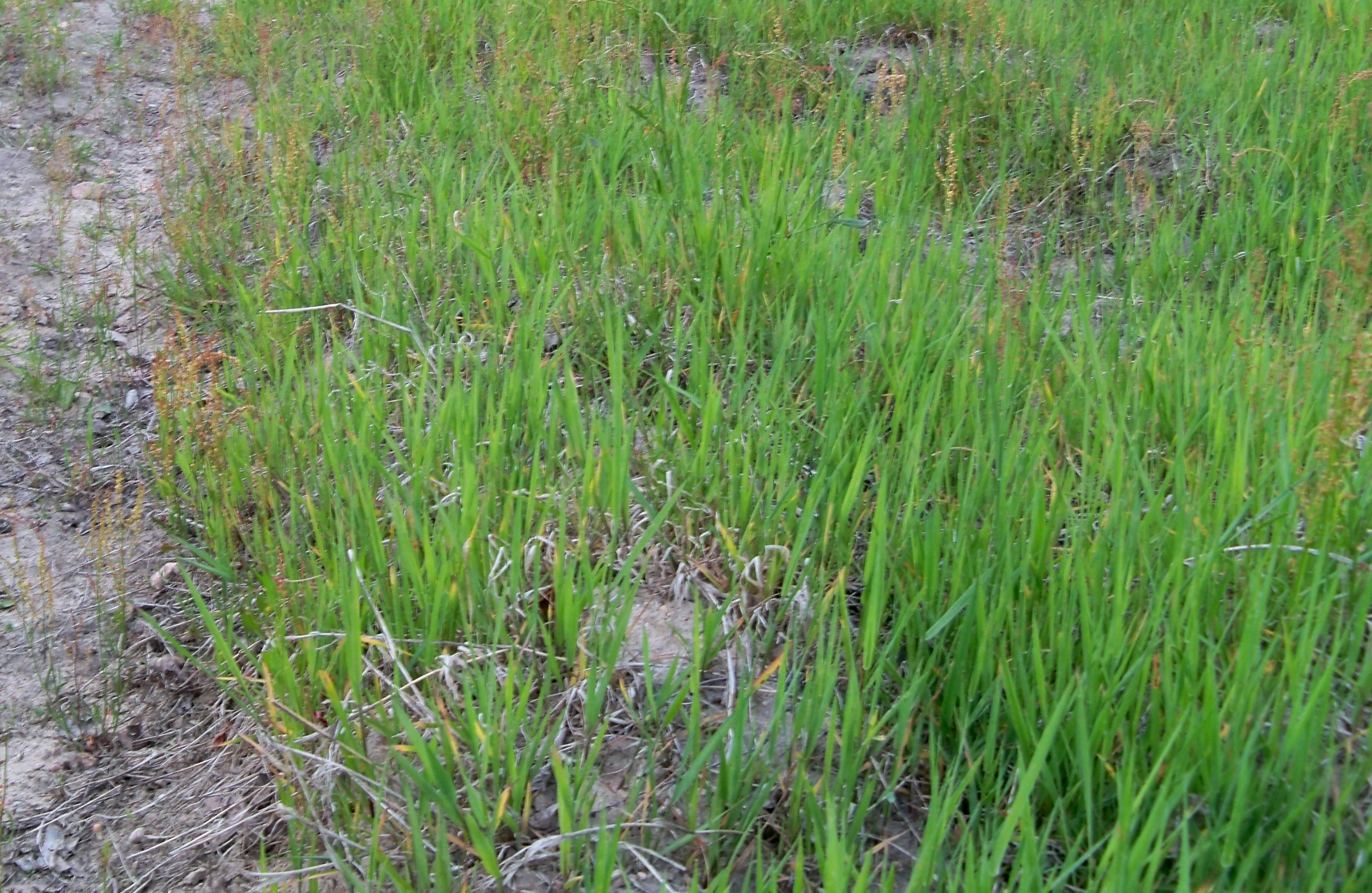 Ugór zarośnięty perzem, Polska